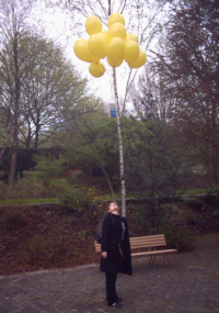 Ballonrelease eines Buches anlässlich eines Bookcrossing-Meetups in Bochum, eine der unzähligen Möglichkeiten ein Buch in die Wildnis zu entlassen. (selbst fotografiert)